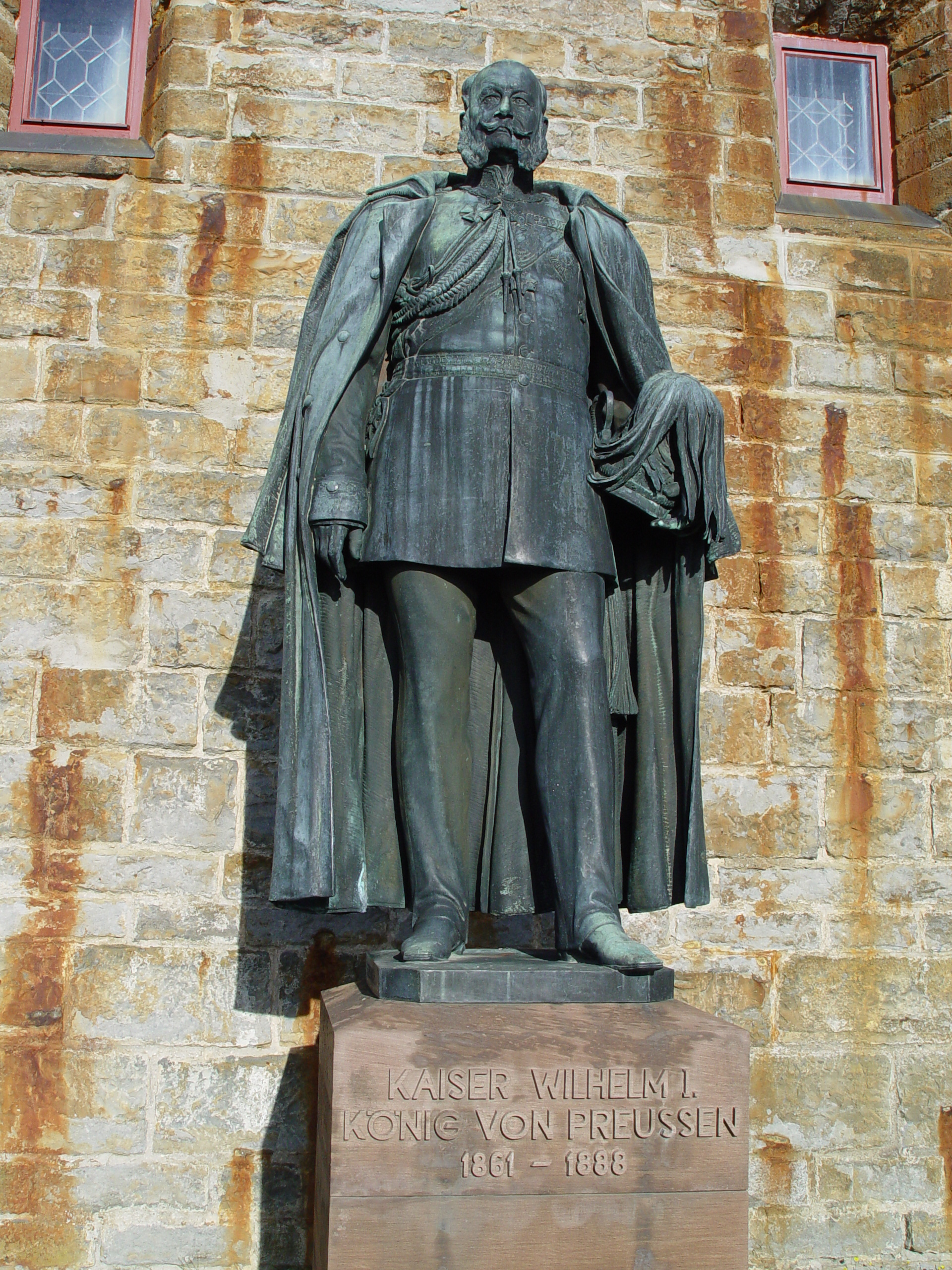 Der Deutsche Kaiser Wilhelm I. Statue auf der Stammburg Hohenzollern